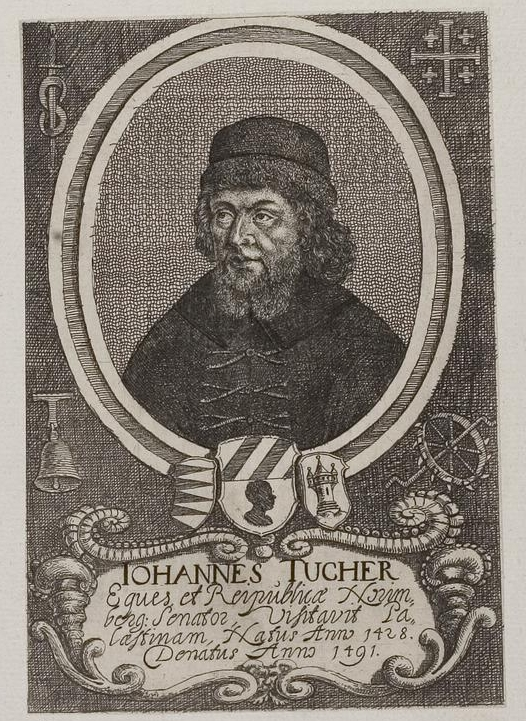 Grafik aus dem Klebeband Nr. 3 der Fürstlich Waldeckschen Hofbibliothek Arolsen Motiv: Hans Tucher (1428–1491), Patrizier u. Palästinareisender; Wallfahrt und Reise in das Gelobte Land 1479 GND: 104357800